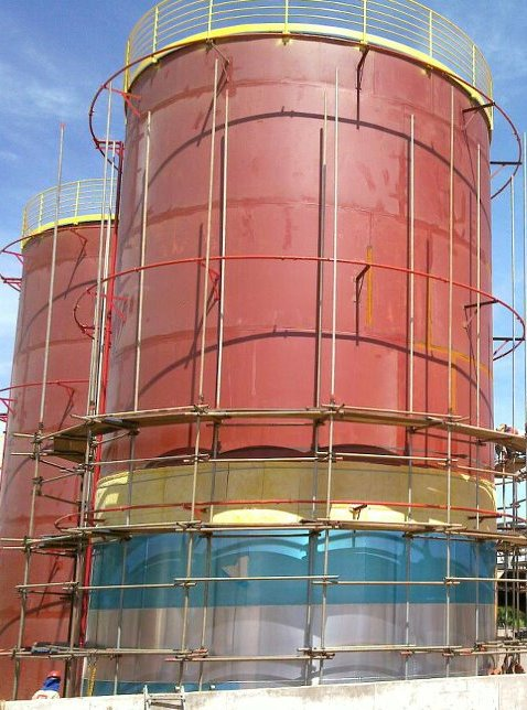 Isolamento térmico em tanque de armazenagem utilizando-se painél de lã de vidro com revestimento metálico em alumínio liso com película protetora que é retirada após instalação das chapas